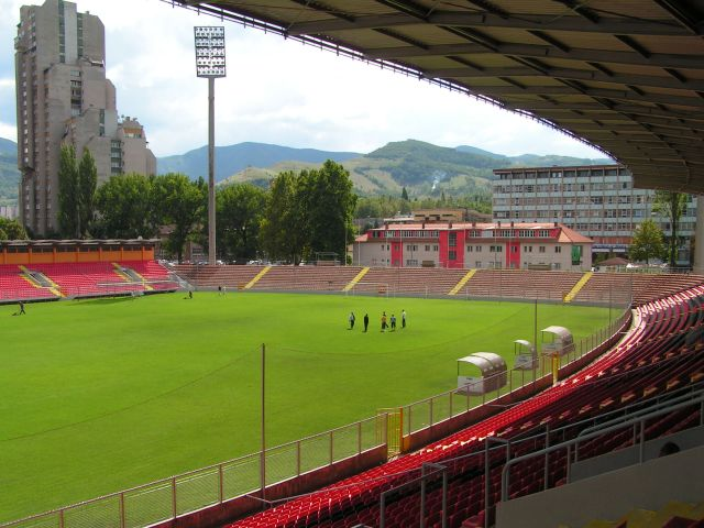 Bilino polje